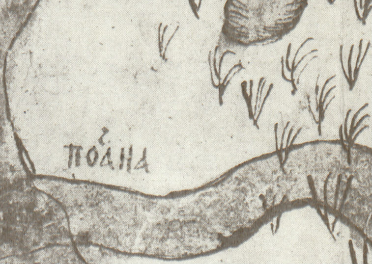 Фрагмент карты - плана города Киева, составленной подполковником Ушаковым в 1695 году по приказу российского императора Петра I. Содержит старинную подпись "Почана" - название реки.